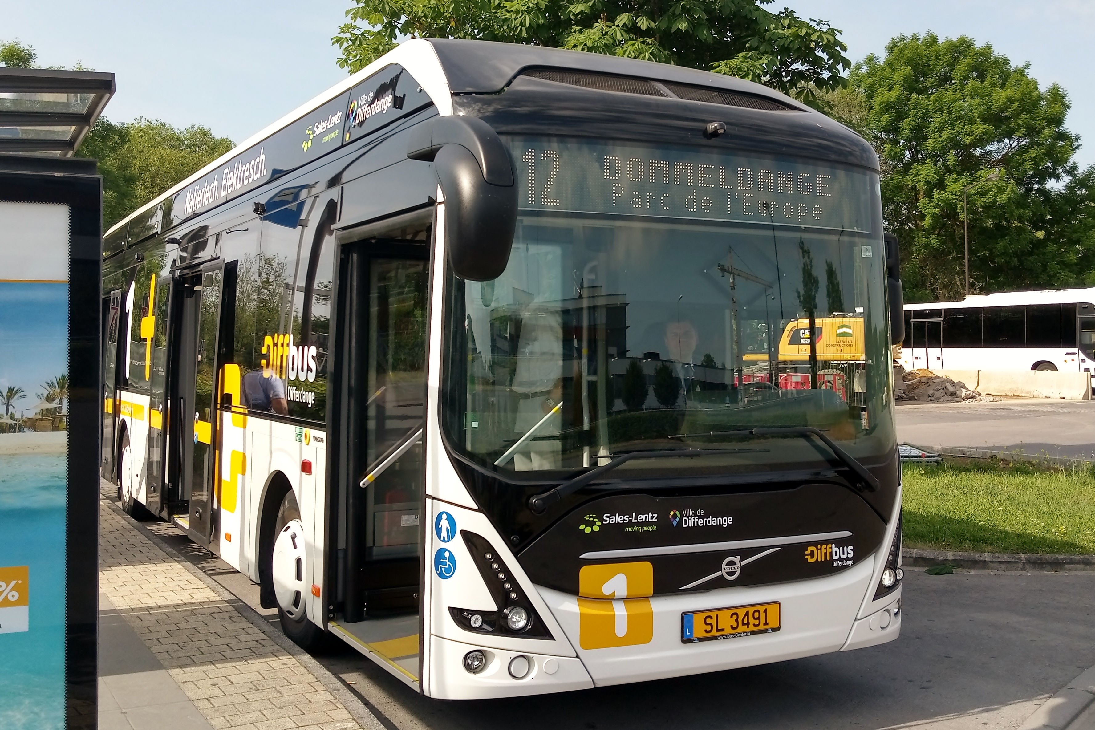 Un bus « Volvo 7900 Electric » à l'arrêt P+R Bouillon. Le véhicule - normalement en service sur le réseau « Diffbus » (Ville de Differdange) - est en essai sur la ligne AVL 12.